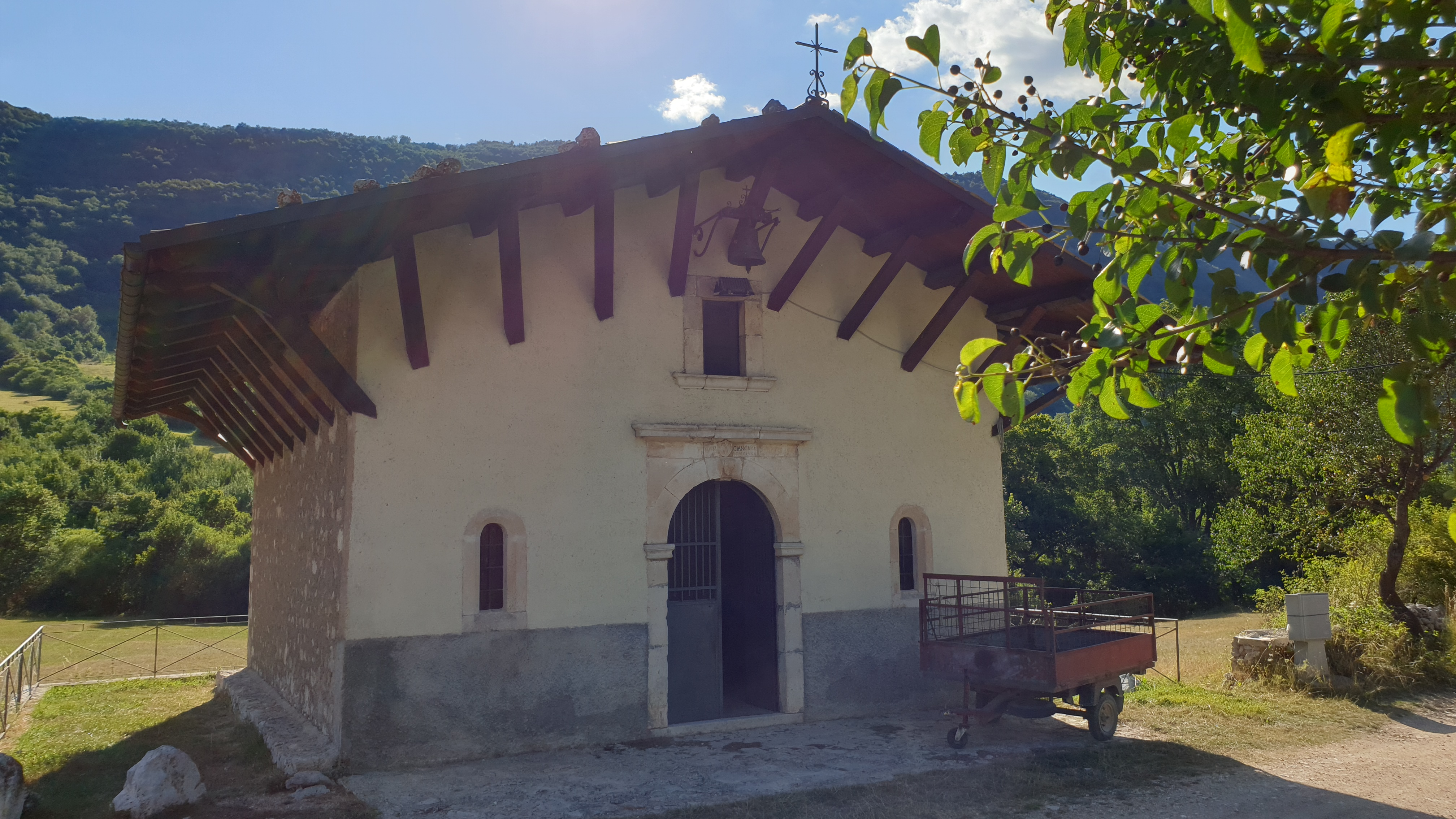 Scanno - Chiesa di San Lorenzo